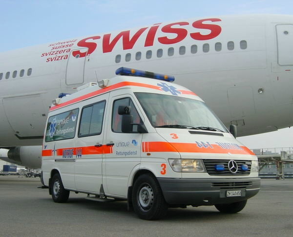 Schweizer Rettungswagen